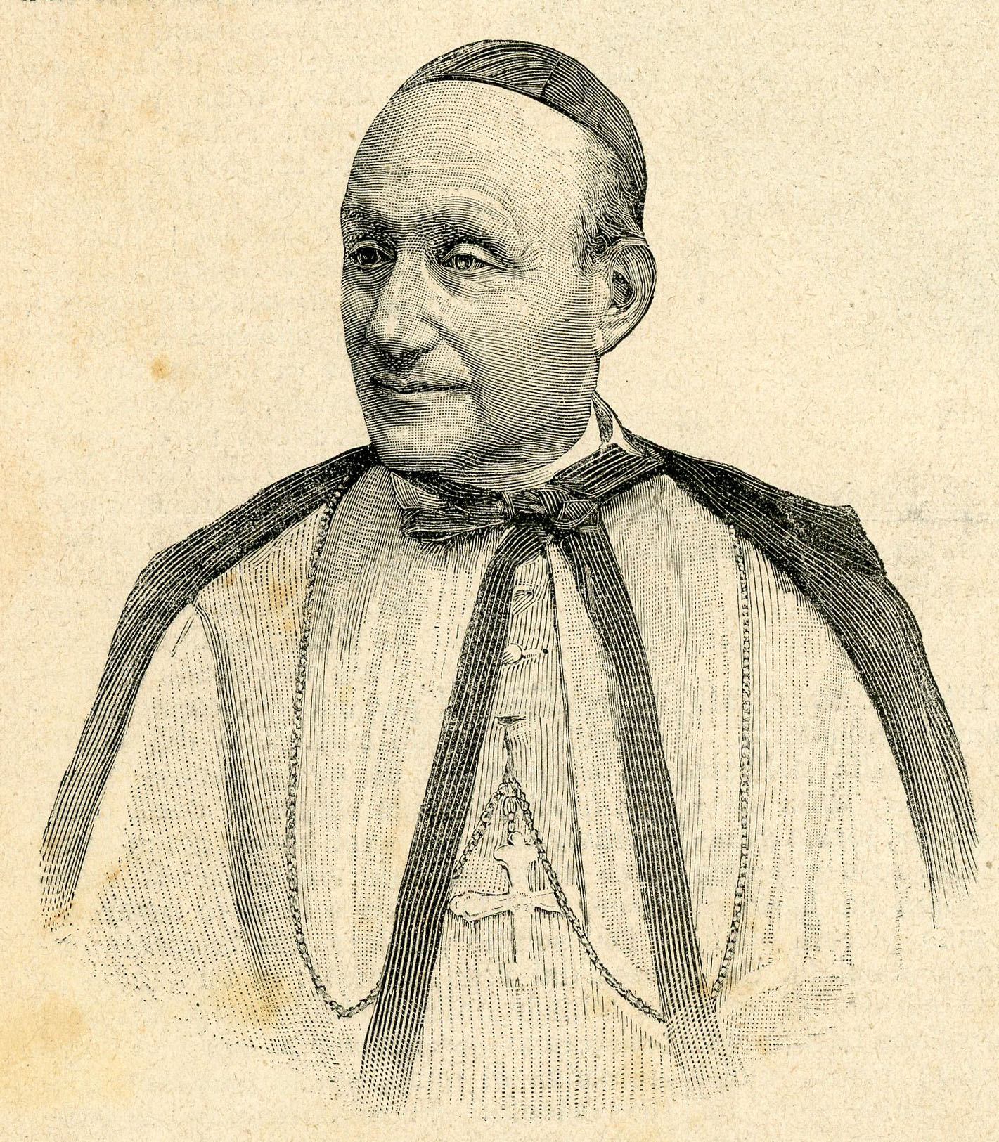 Cardinale Egidio Mauri, arcivescovo di Ferrara (xilografia).